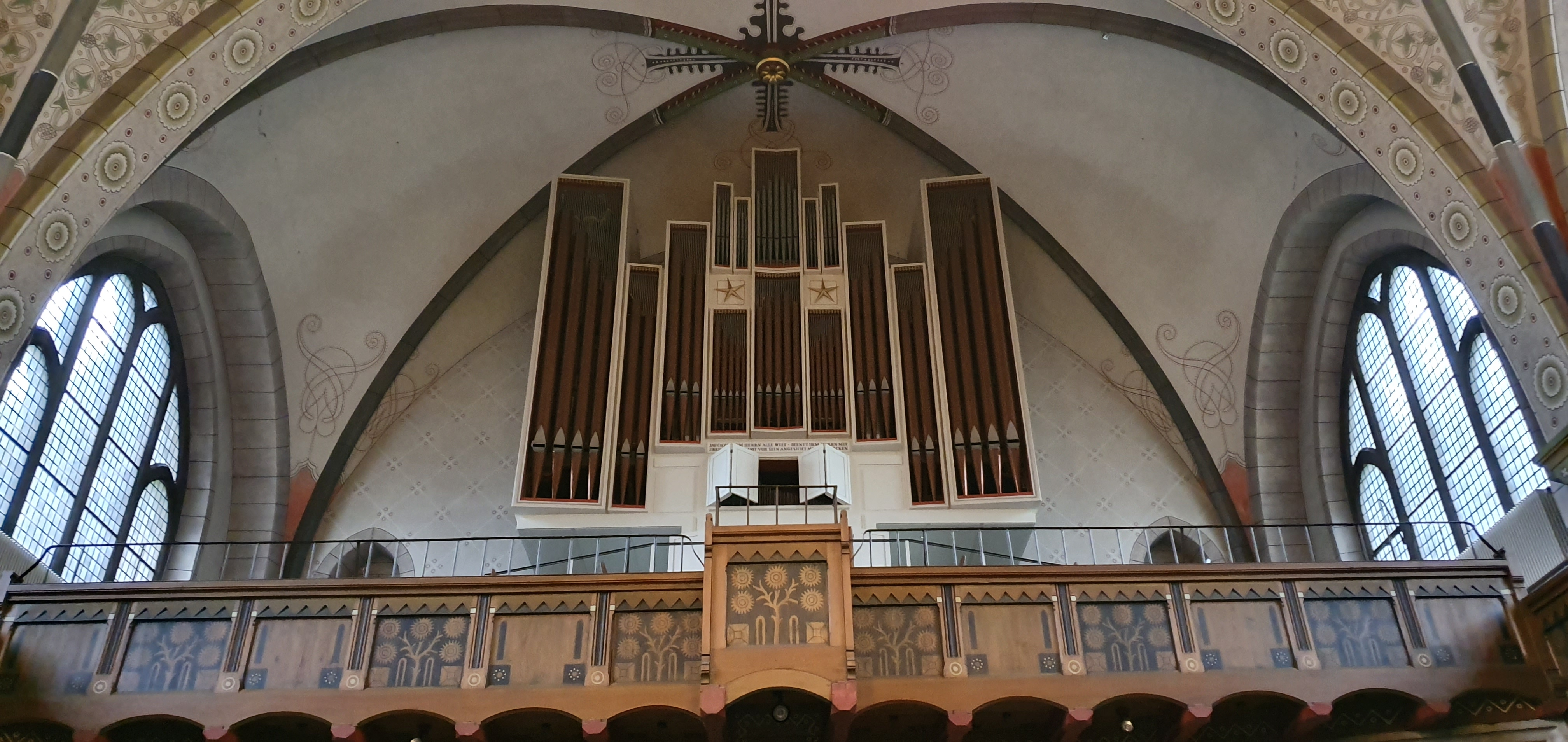 Die Gebr. Hillebrand - Orgel von 1967 (erweitert 2019) in der Herrenhäuser Kirche